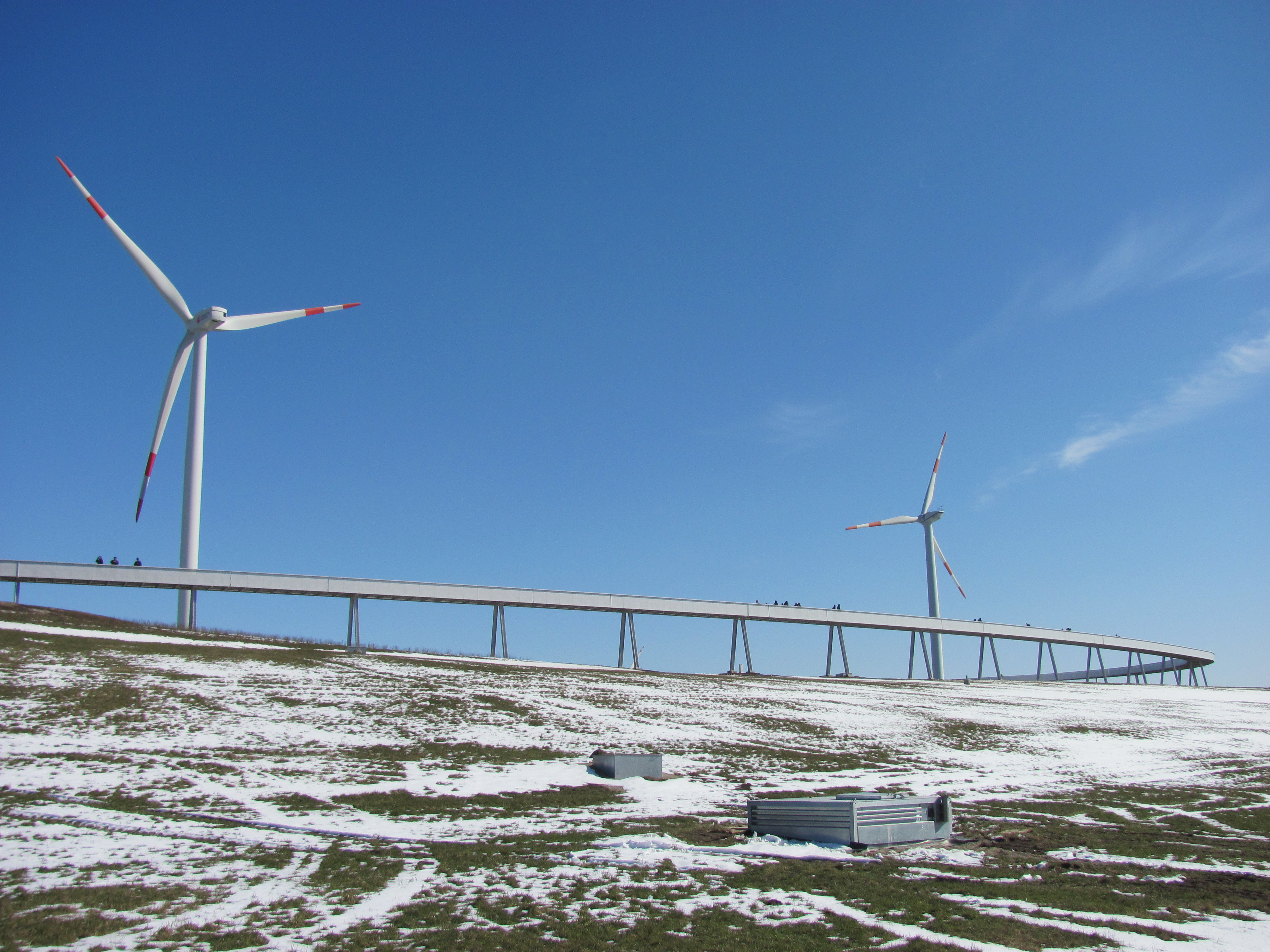 Horizontweg auf dem Energieberg Georgswerder in Hamburg-Wilhelmsburg